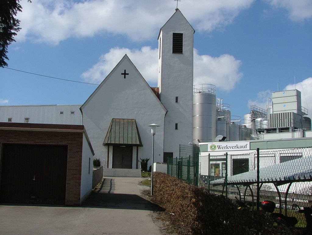 Kapelle